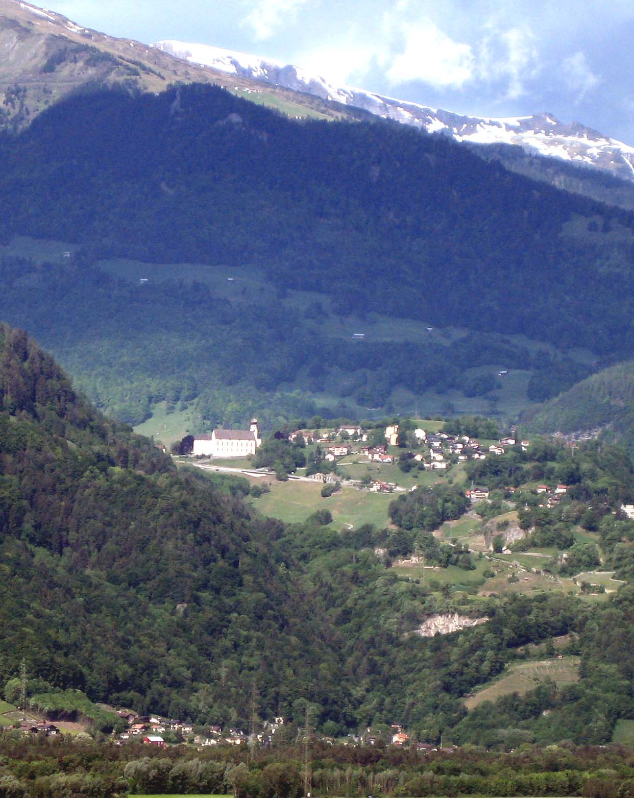 Pfäfers mit Klosters